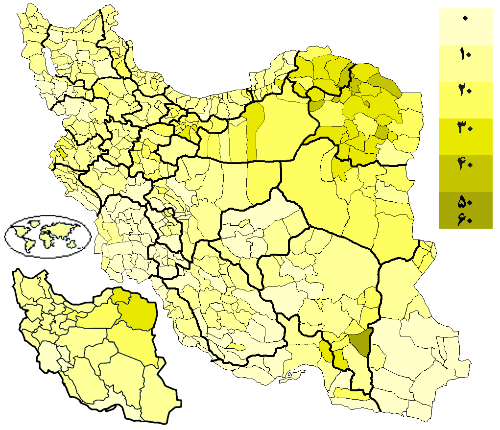 درصد رای محمدباقر قالیباف در انتخابات ریاست‌جمهوری ایران (۱۳۹۲) به تفکیک شهرستان Provinces of Iran